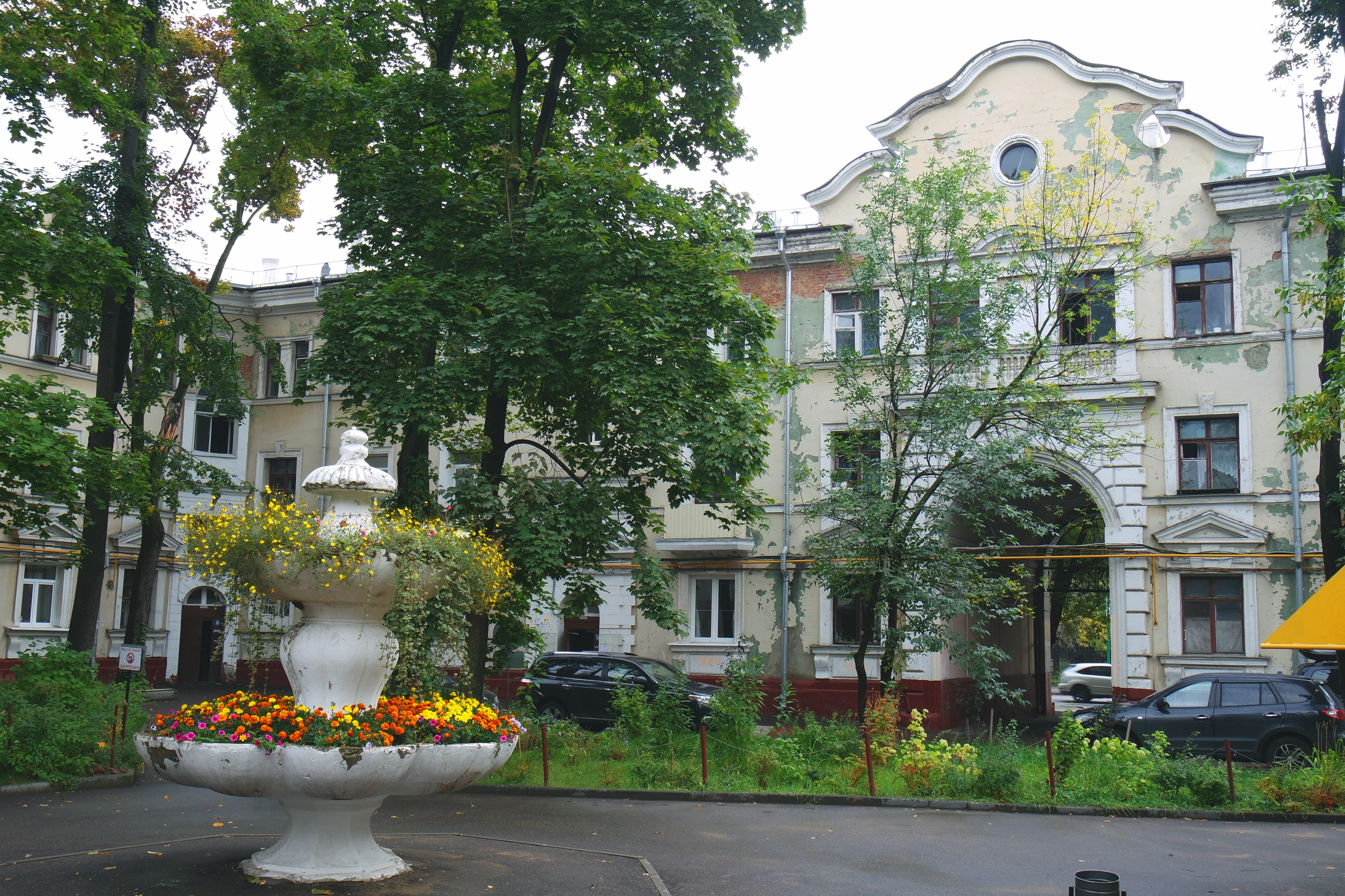 Жилой дом: Руставели ул., дом 9, Бутырский, Северо-Восточный округ, Москва (внутренний двор). 1947 года, арх. Я. Г. Лихтенберг